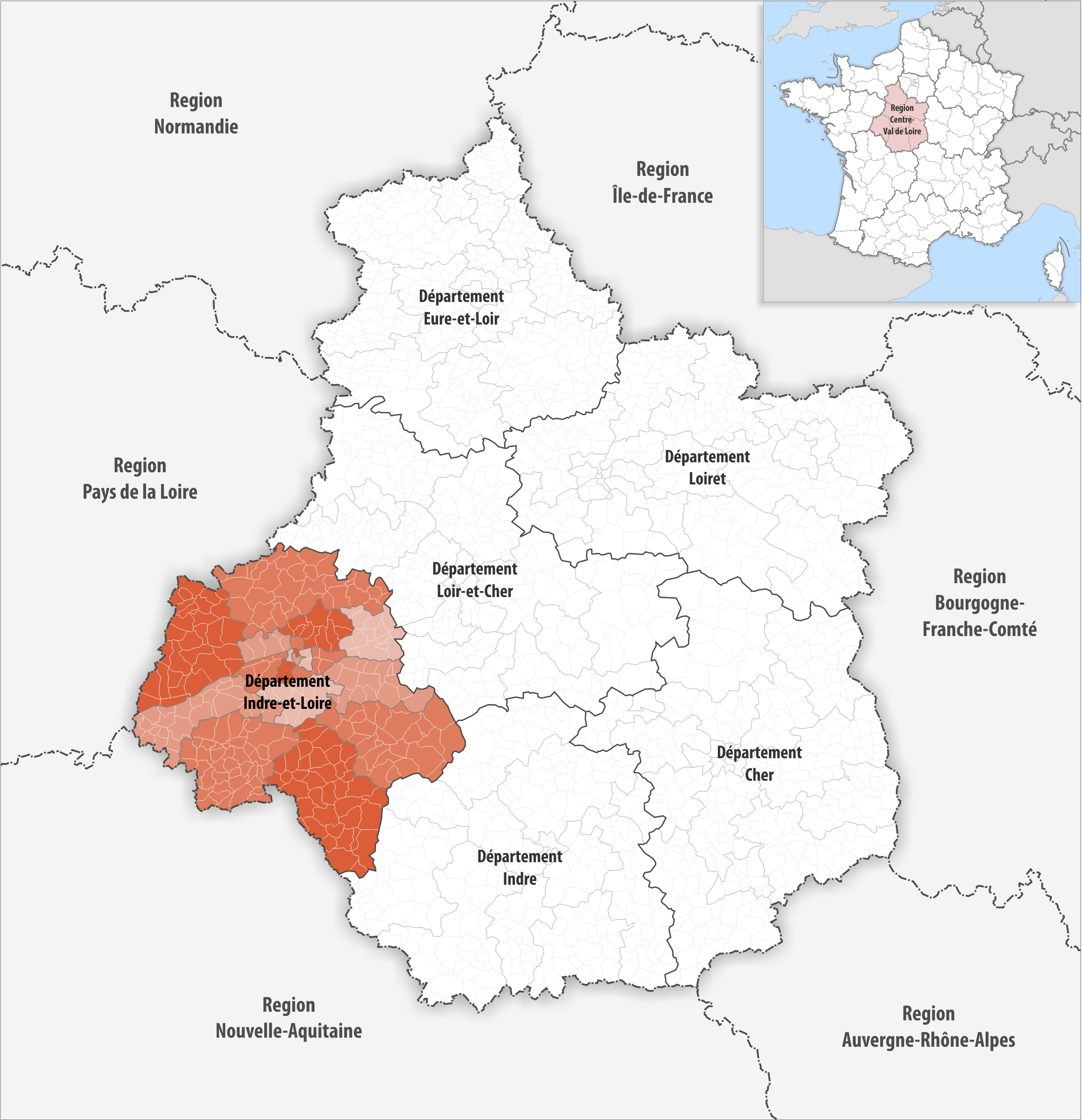 Lage des Departements Indre-et-Loire